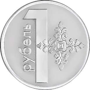 1 белорусский рубль образца 2009 года (реверс)